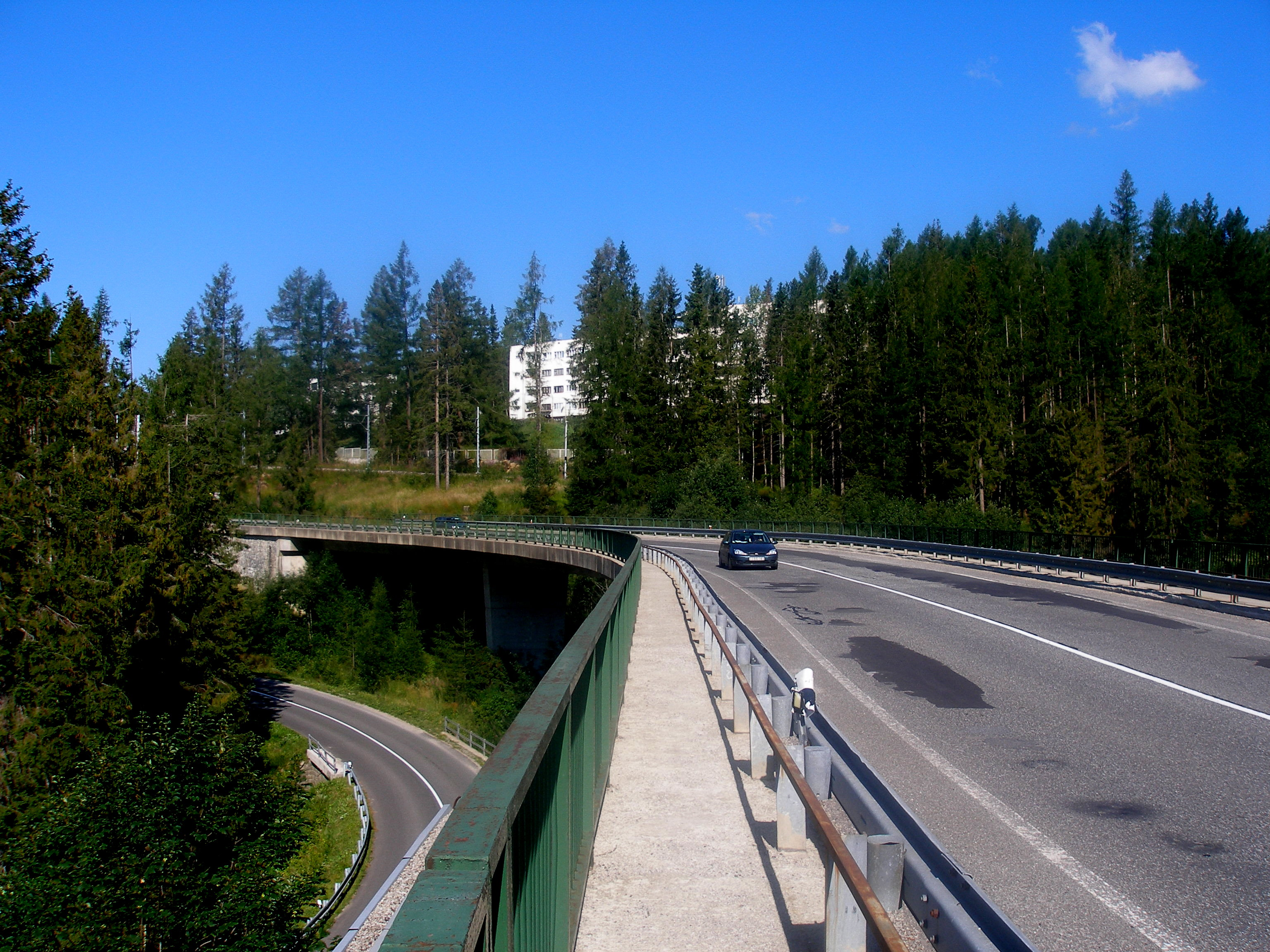 Osada Vyšné Hágy